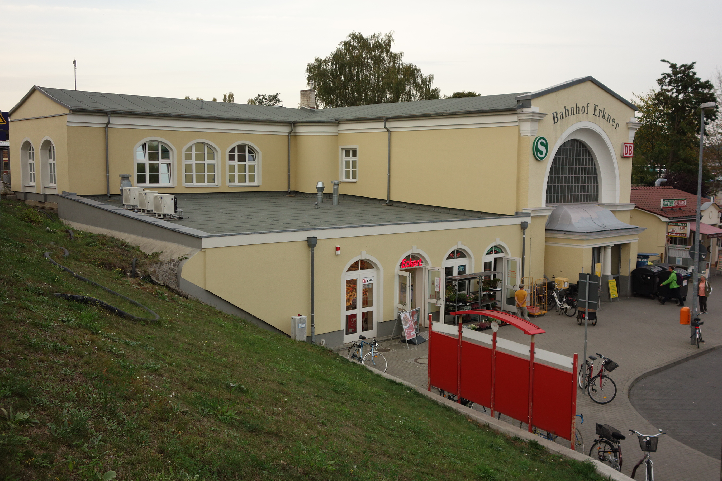 Bahnhof Erkner, Empfangsgebäude